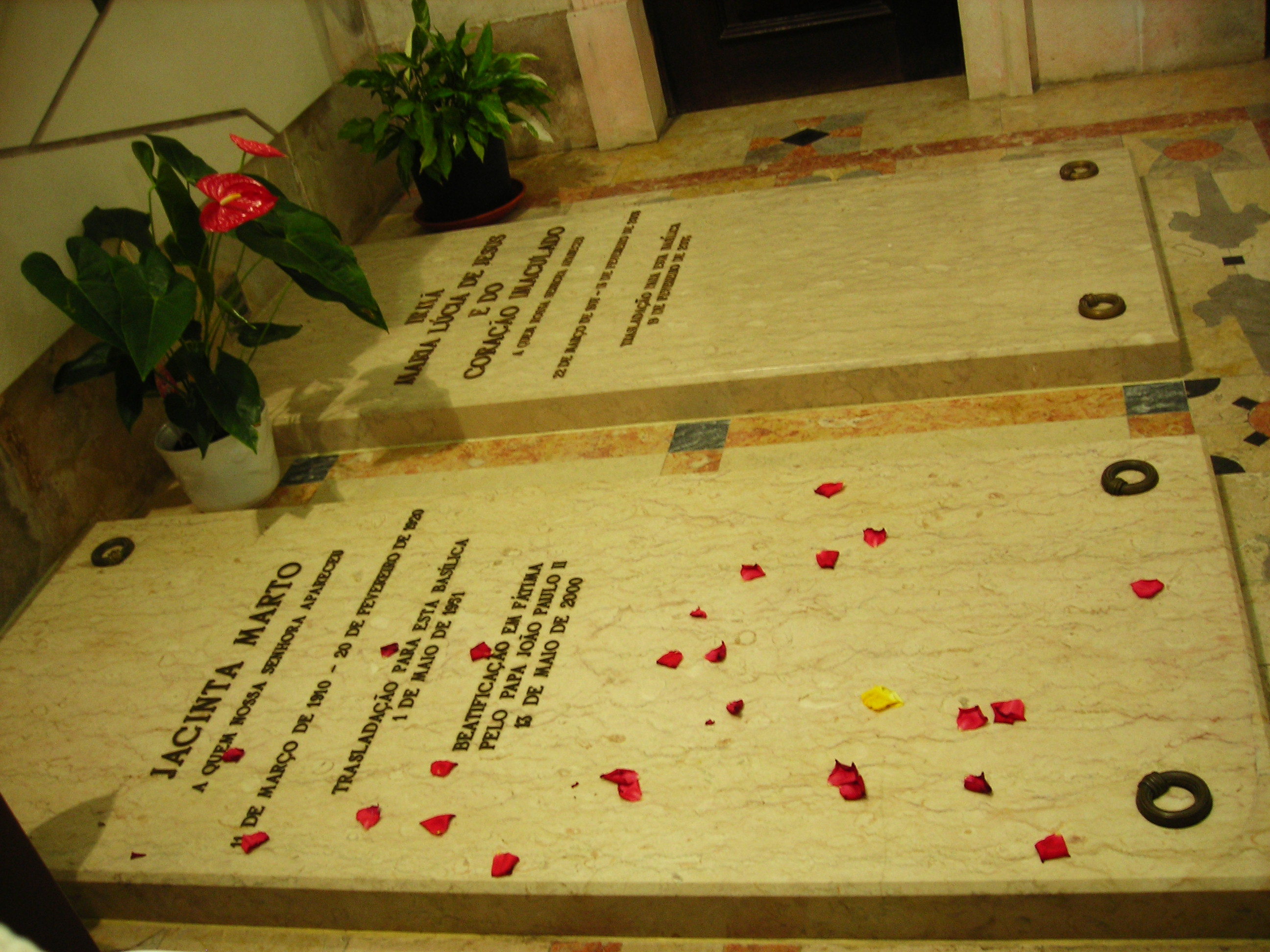 Santuário de Fátima